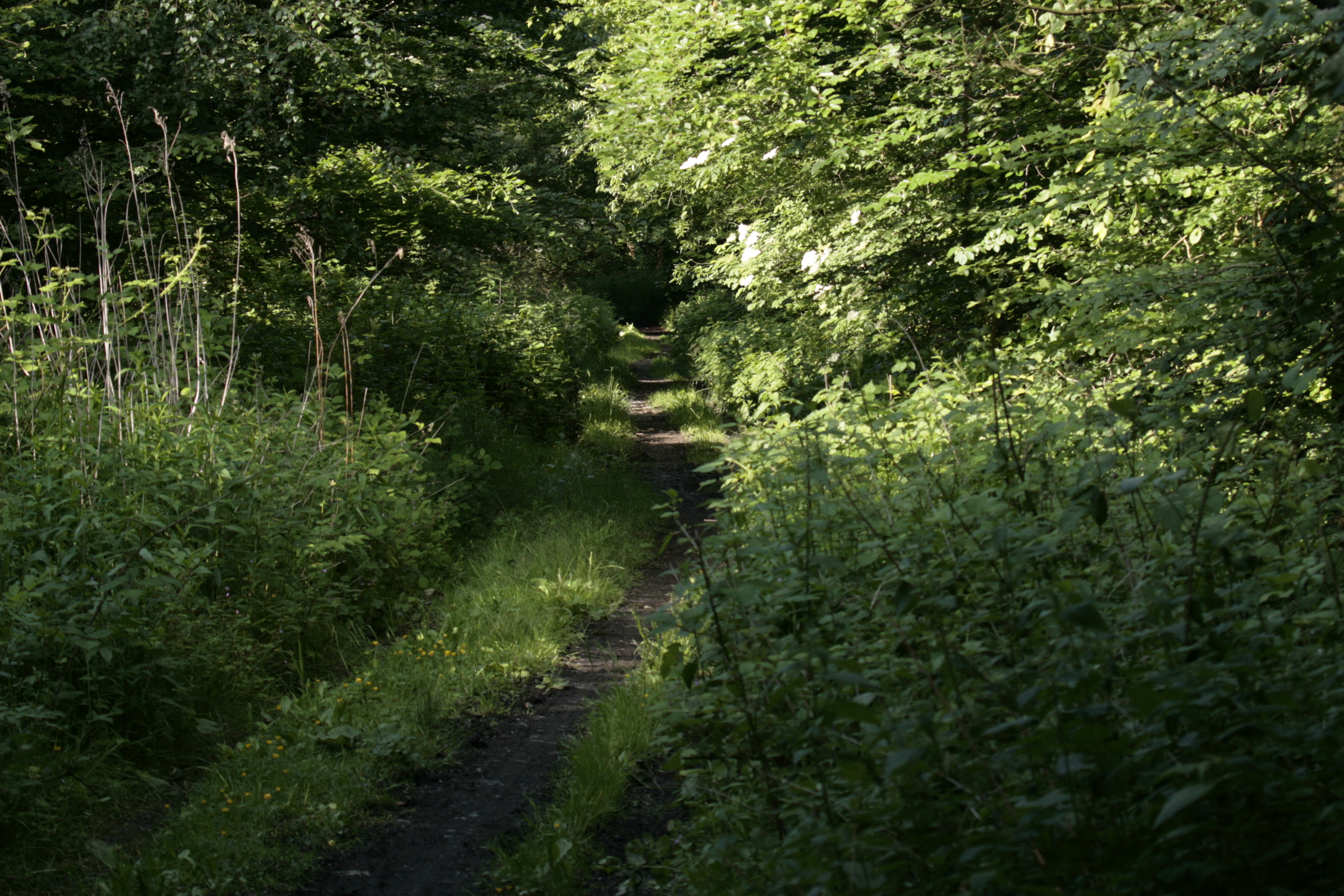 Weg im Laub-Mischwald/Buchenwald im Naturschutzgebiet Wälder bei Cappenberg, West, Gebietskennung UN-050